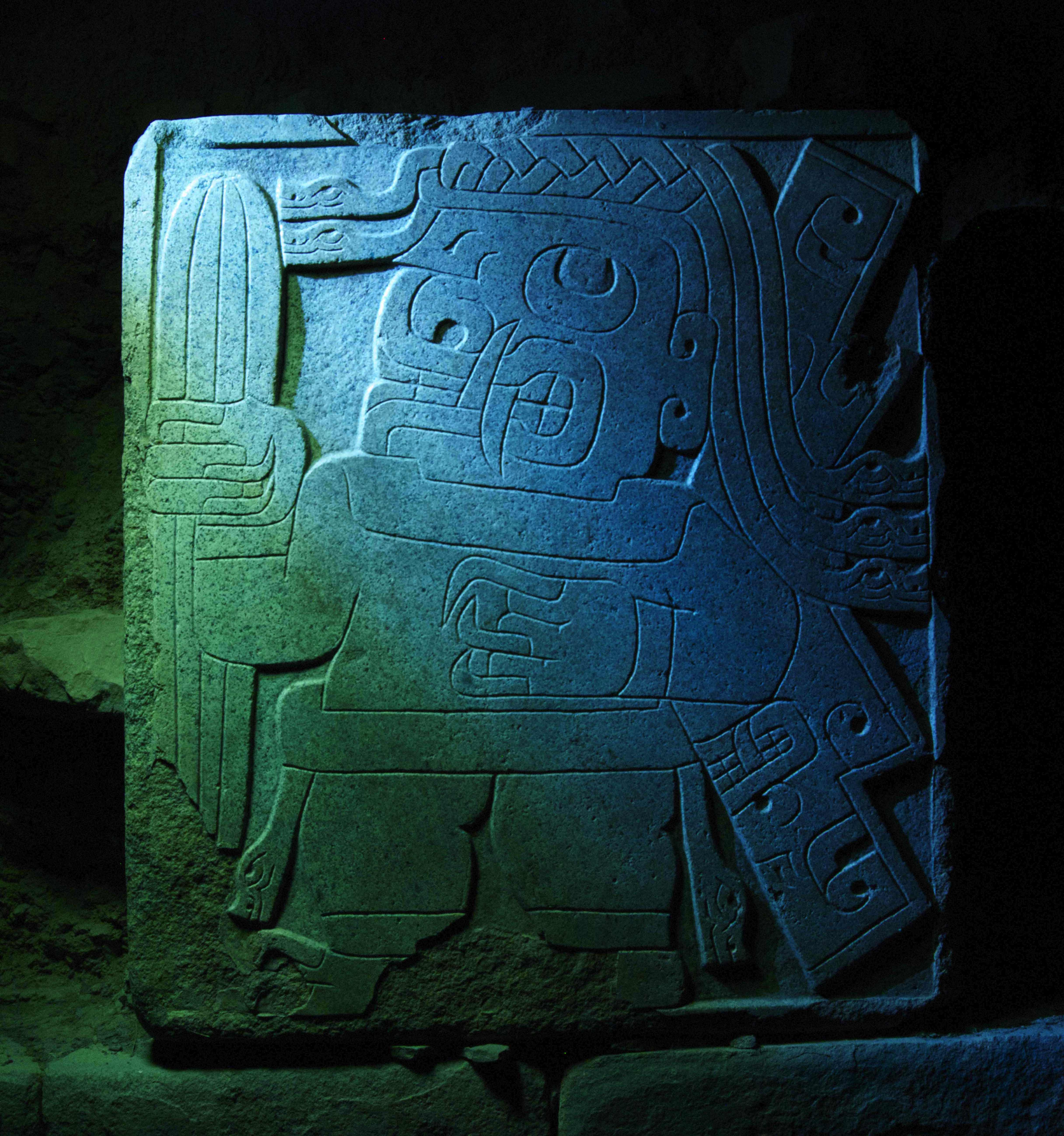 Estela del Portador del Cactus San Pedro en la Plaza Circular de Chavín de Huántar. Fotografía tomada durante el rodaje de la película Peregrina en Áncash, Perú, el 2012.